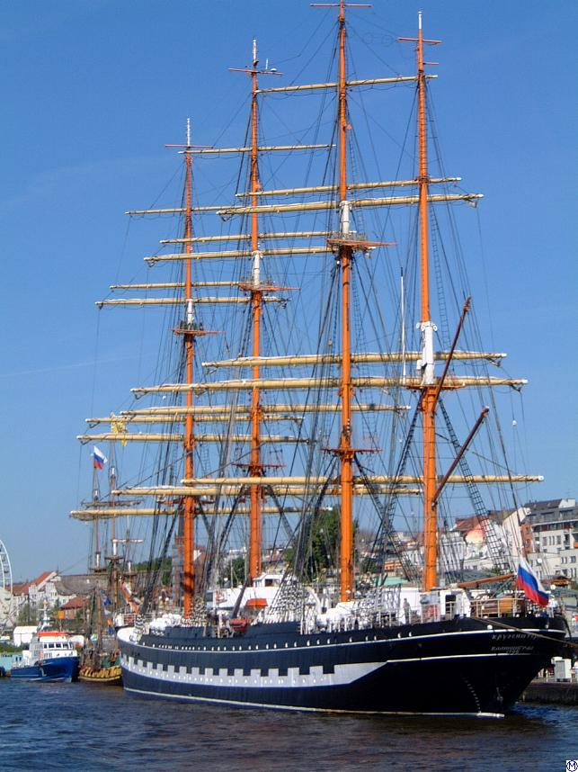 Russische Viermastbark Krusenstern aka Kruzenstern 13/5/2001 in Hamburg